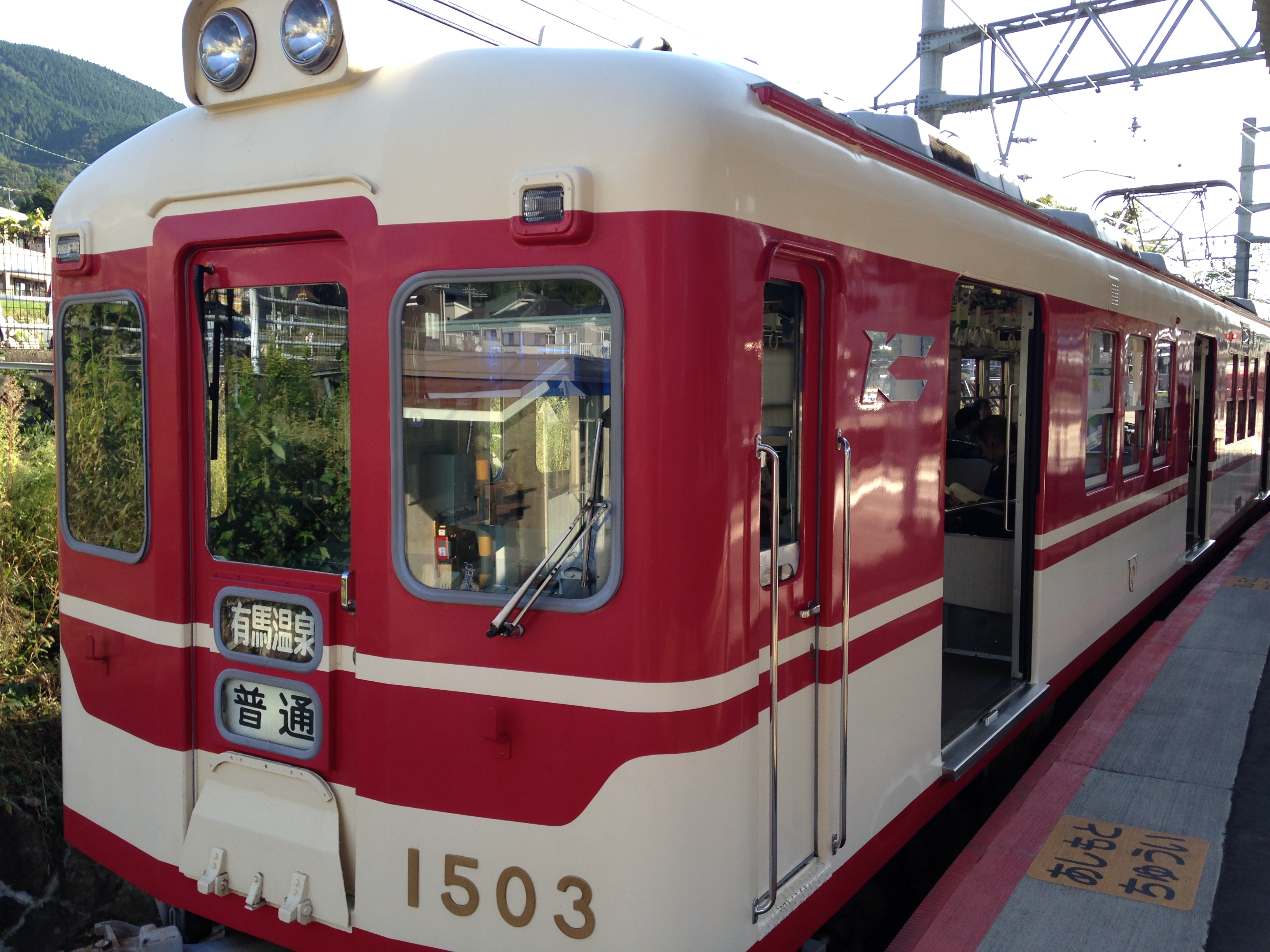 出発前の有馬温泉行き列車(有馬口駅にて)